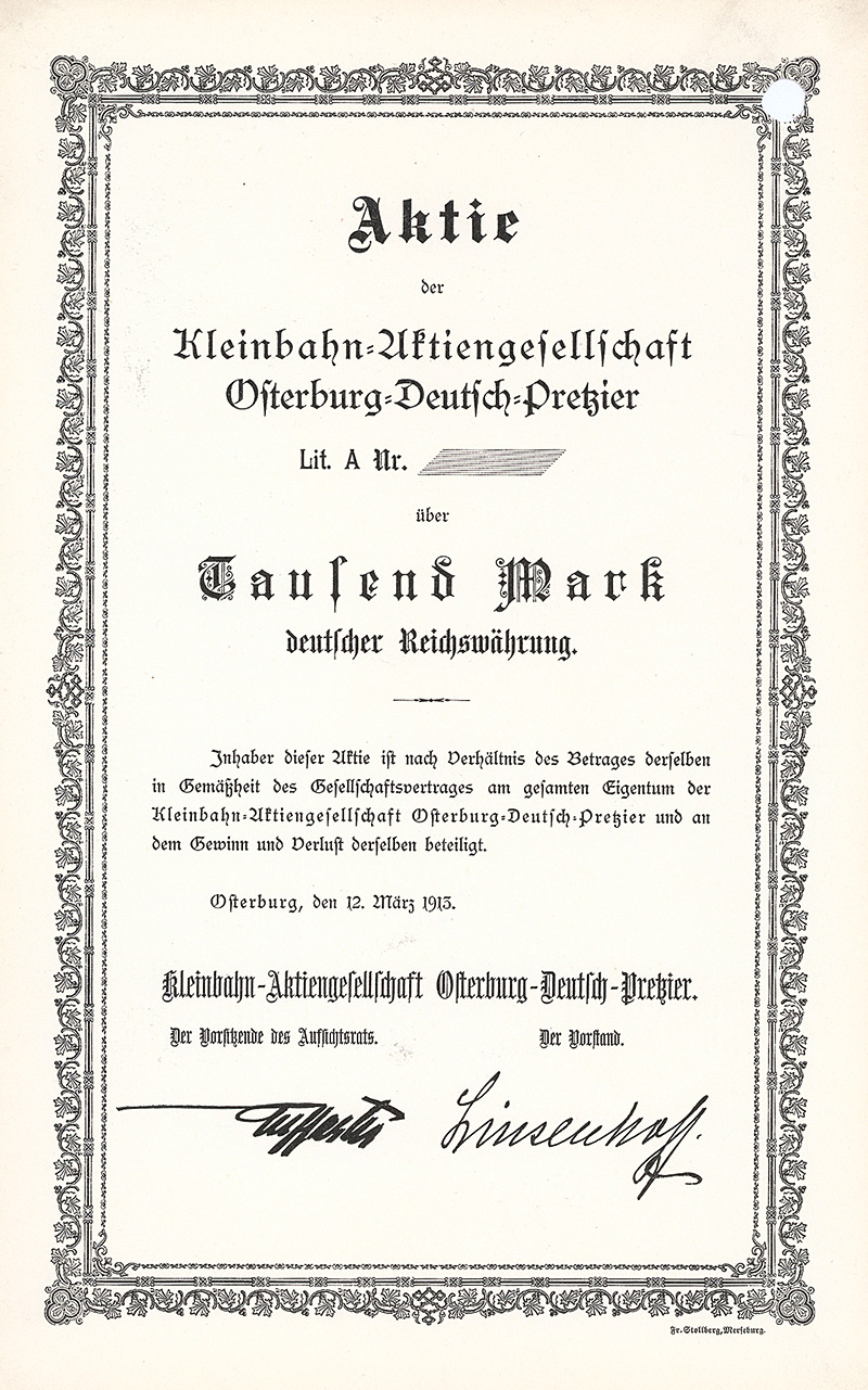 Aktienblankette der Kleinbahn AG Osterburg-Deutsch-Pretzier vom 12. März 1913